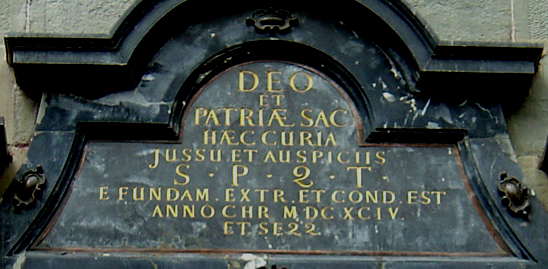 Detail vom Portal des Zürcher Rathauses (Ostseite). Die Inschrift lautet „DEO ET PATRIÆ SAC[ræ(1)/ra(2)]. HÆC CURIA JUSSU ET AUSPICIIS S[enatus]·P[opuli]·Q[ue]·T[uricensis]· E FUNDAM[ento]. EXTR[ucta]. ET COND[ita]. EST ANNO CHR[isti]. MDCXCIV. ET SEQQ [sequentibus]“, deutsch: „Gott und dem heiligen Vaterland [gewidmet] (1)/Gott und dem Vaterland geweiht (2), wurde dieses Behördengebäude auf Geheiß und unter Aufsicht des Zürcher Senats und Volkes auf dem Fundament errichtet und gegründet im Jahre Christi 1694 und folgenden“. Die Abkürzung S.P.Q.T. ist ein Bezug auf die bekannte Abkürzung S.P.Q.R. der Stadtrepublik Rom. Statt Senatus Populusque Romanus heißt es Senatus Populusque Turicensis (Zürich = lat. Turicum).